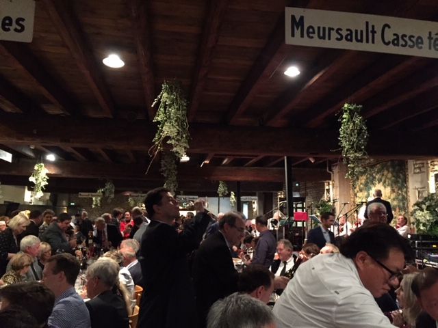 feiern, den Wein teilen und sich gegenseitig helfen.